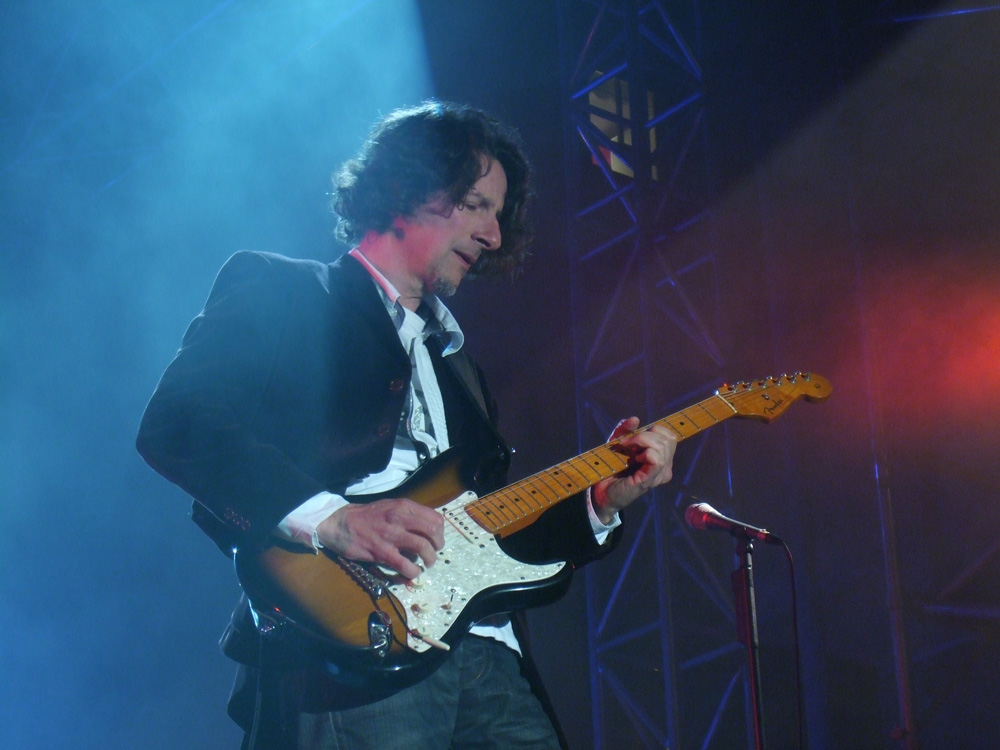 Juan Luis Giménez de Presuntos Implicados, en un concierto en el Puerto de Sagunto, 18-03-2009